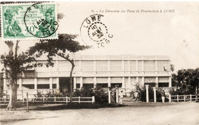 Immeuble de la Direction des Chemins de Fer construit en juillet 1928 à Lomé. Aujourd'hui, le ministère des Affaires étrangères.